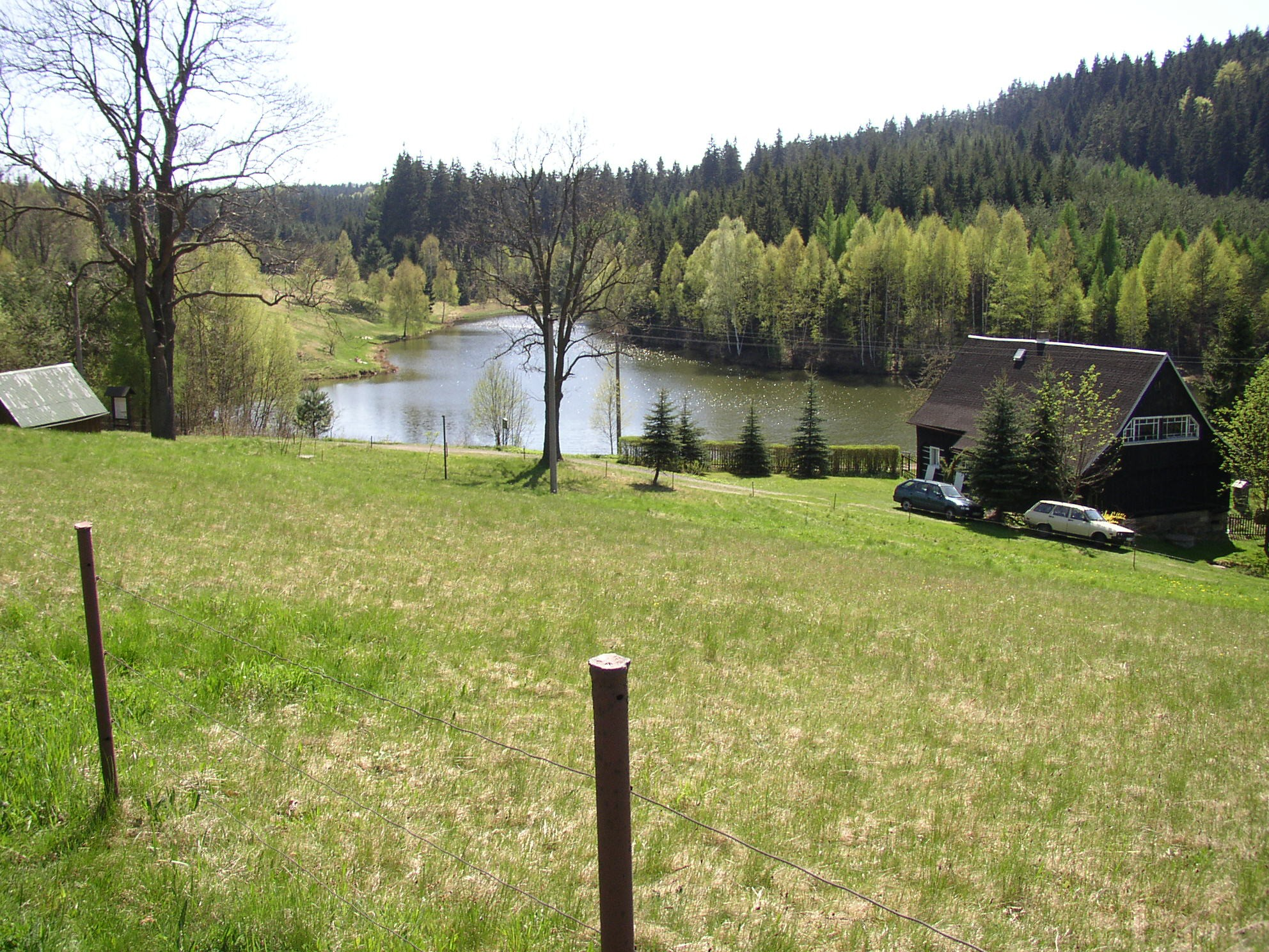 Kyjovská přehrada